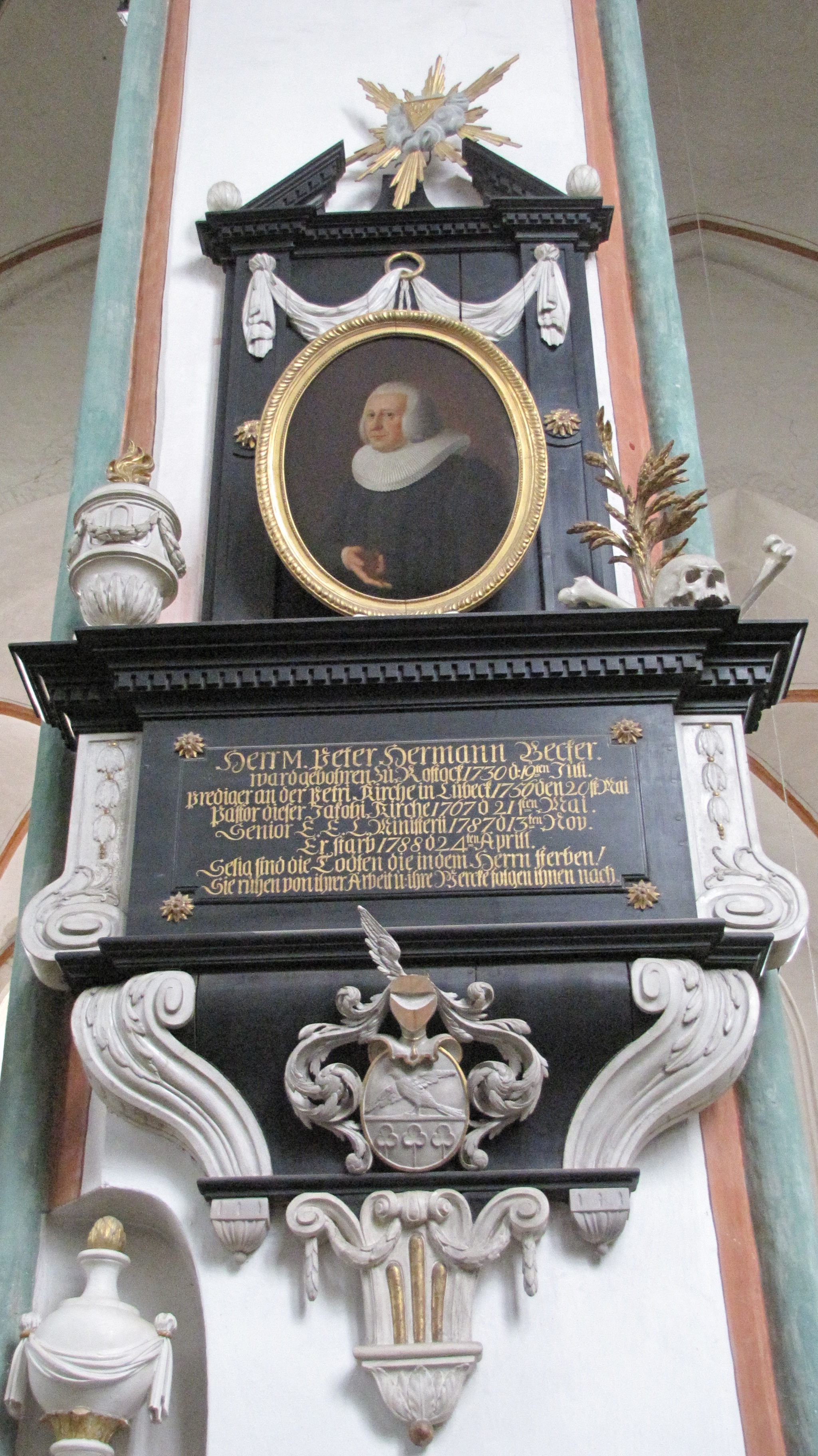 Epitaph for Pastor and Senior Peter Hermann Becker (1730-1788) inSt. Jakobi, Lübeck